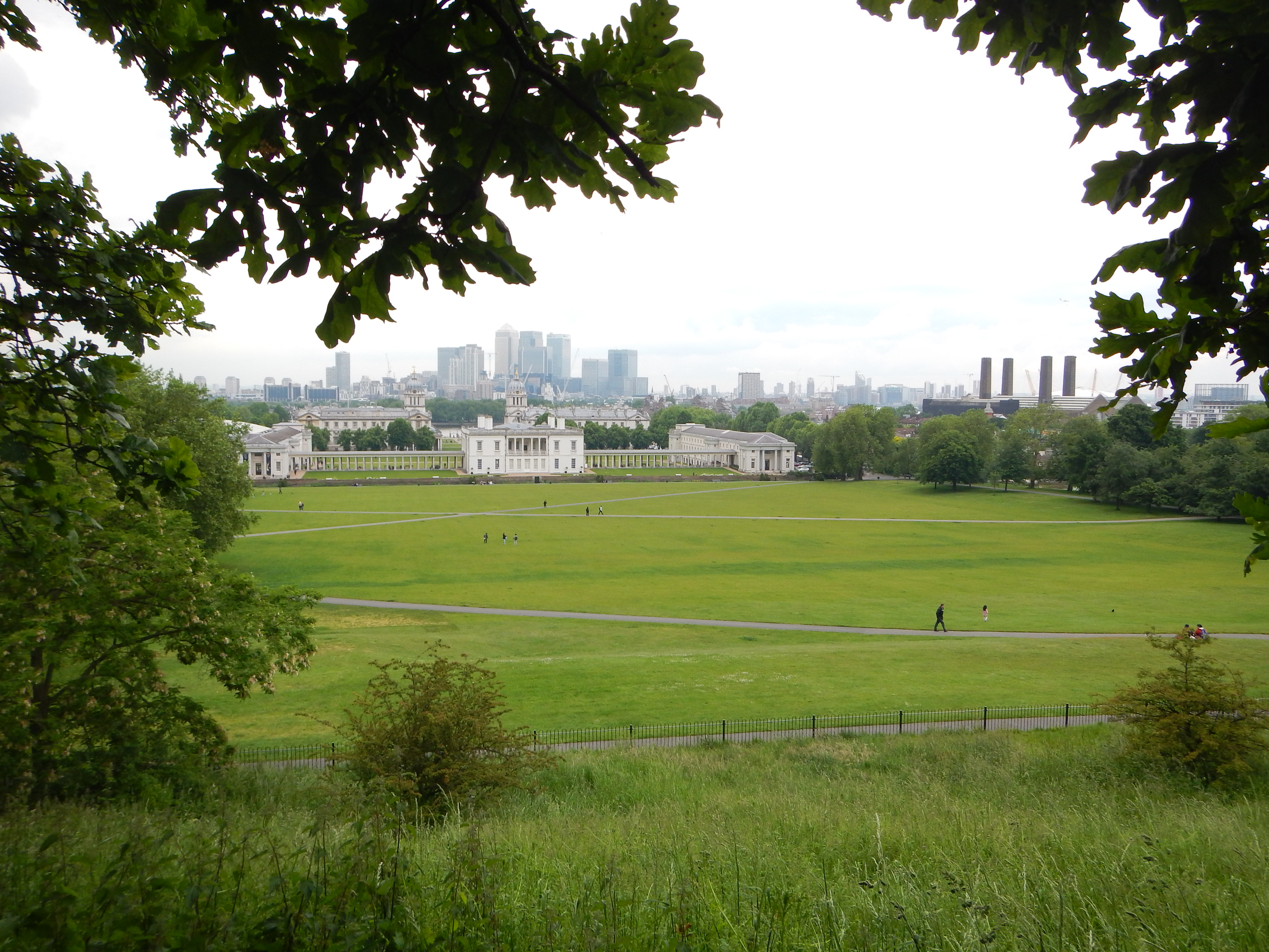 Pohled na greenwichský park v Londýně a na Queens House.